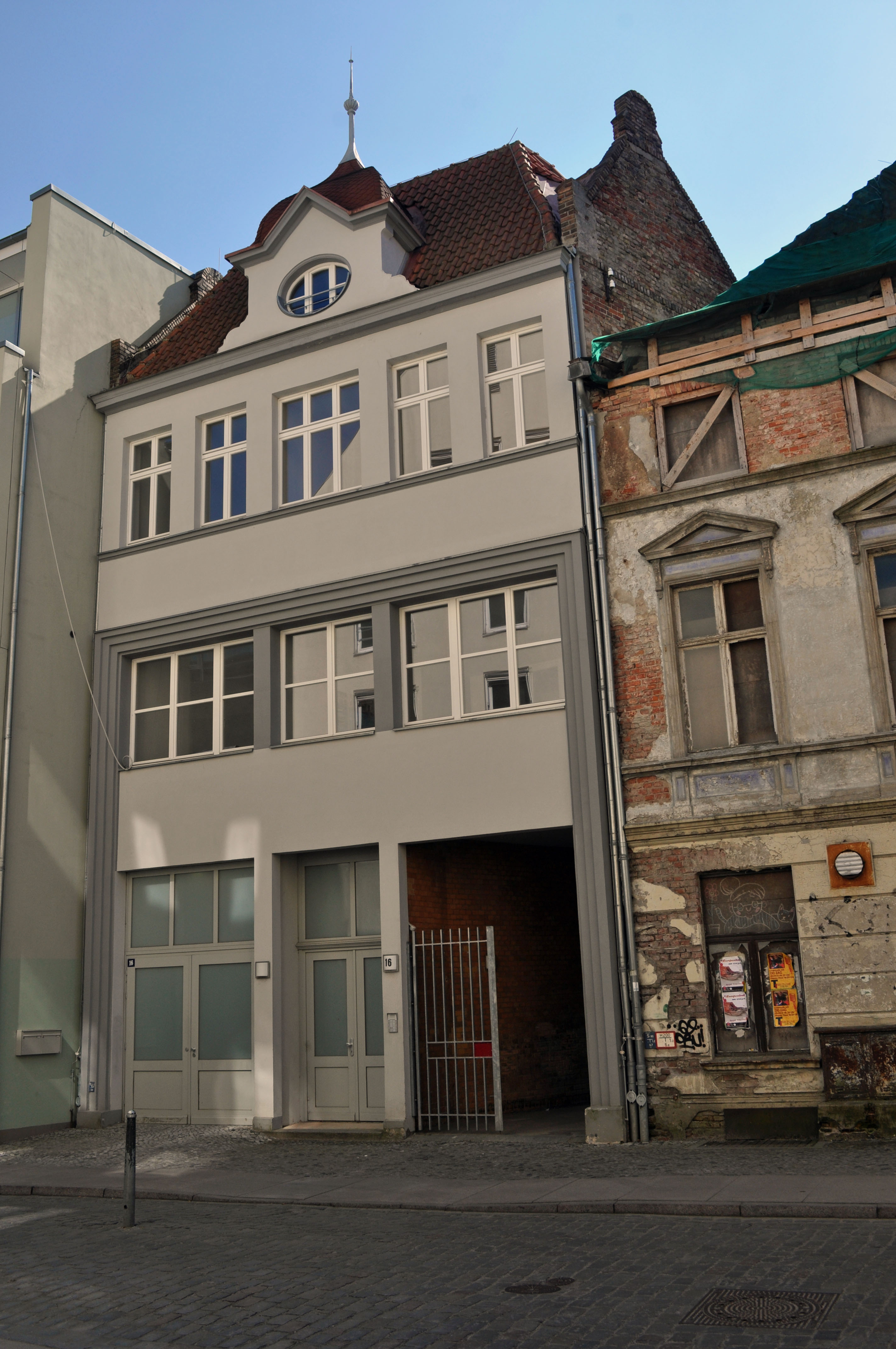 Gebäude bzw. Gebäudedetail in Stralsund. Straße und Hausnummer siehe Dateiname.